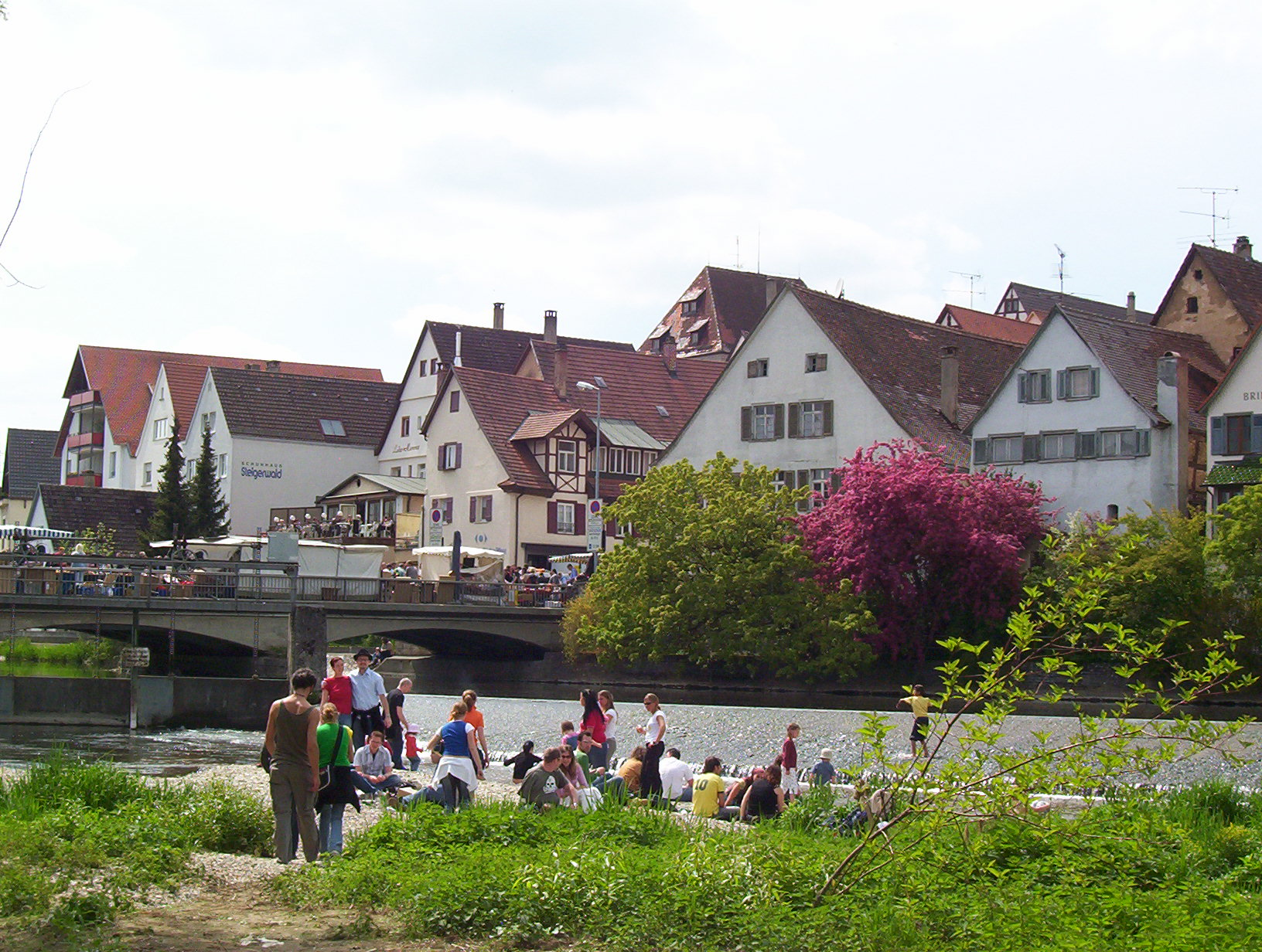 Fotograf: Bernd Reichelt. Aufgenommen Flohmarkt 2004